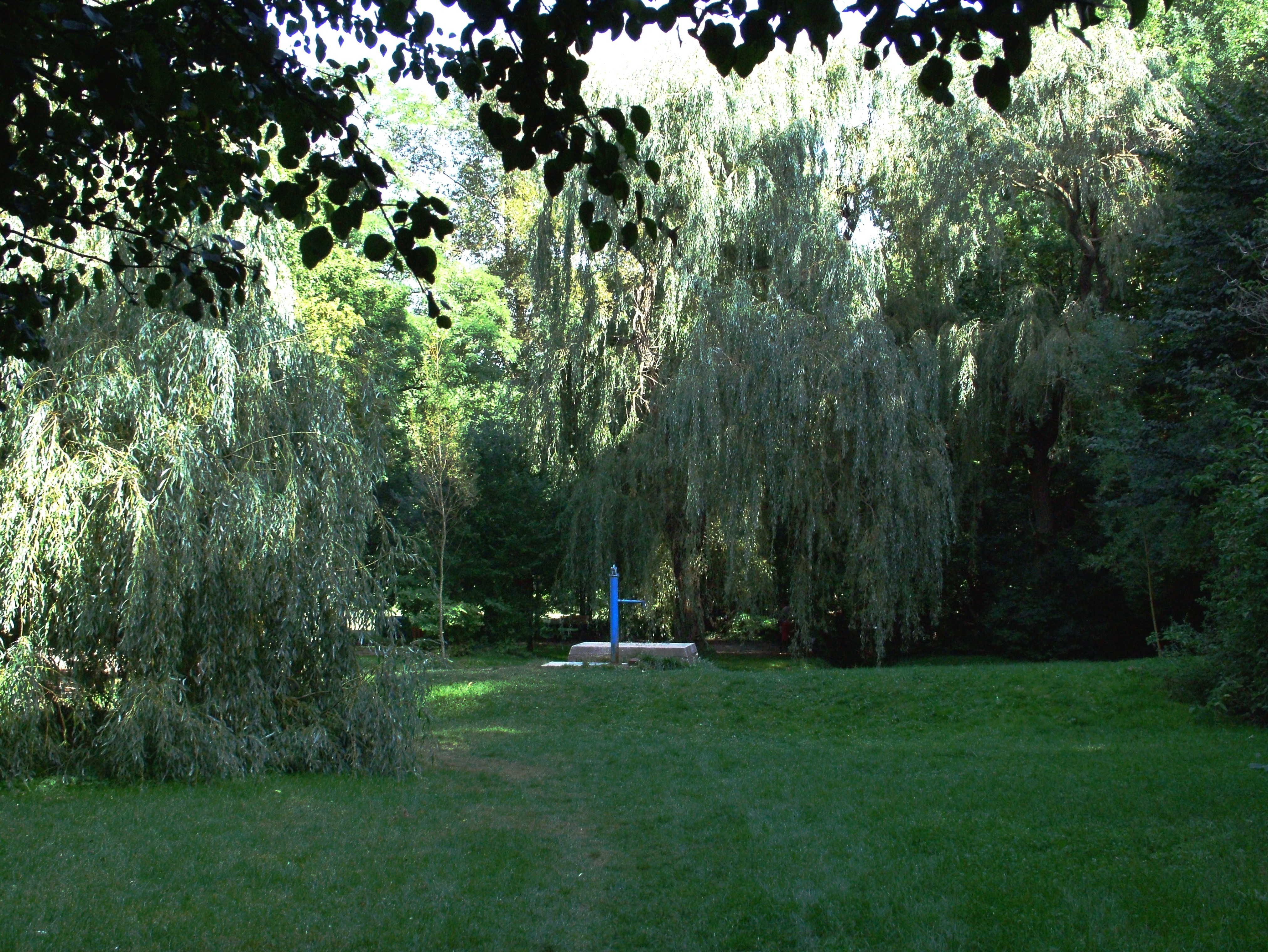 Koloska-völgy, Balatonfüred